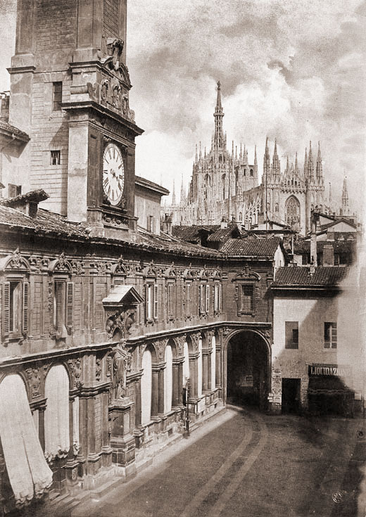 Piazza Mercanti prima degli sventramenti; si noti il Duomo ancoa munito del basso campanile poi demolito nel 1866